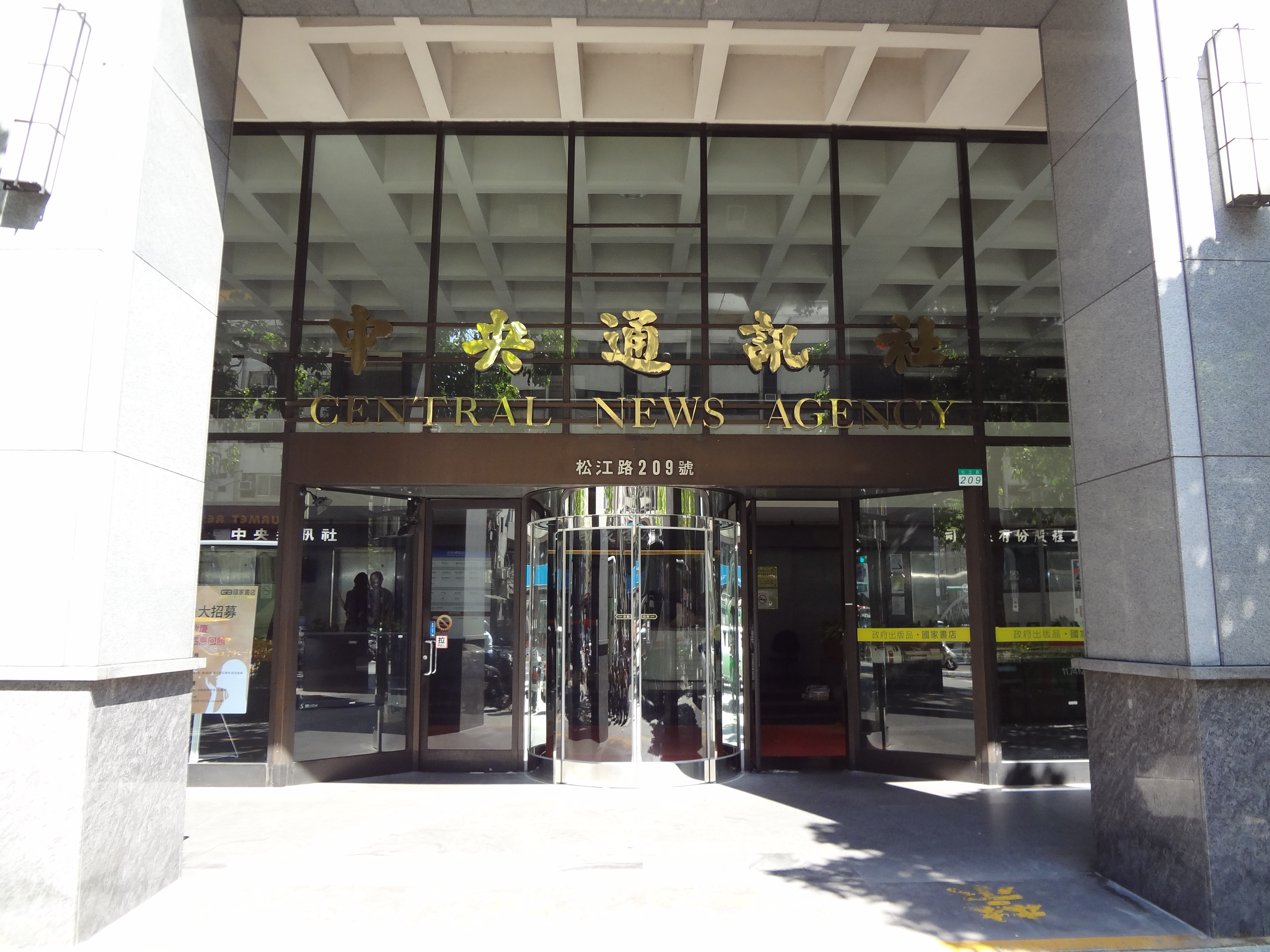 中文（台灣）: 志清大樓一樓的中央通訊社大門，中央為自動門，左右兩側為手動門。